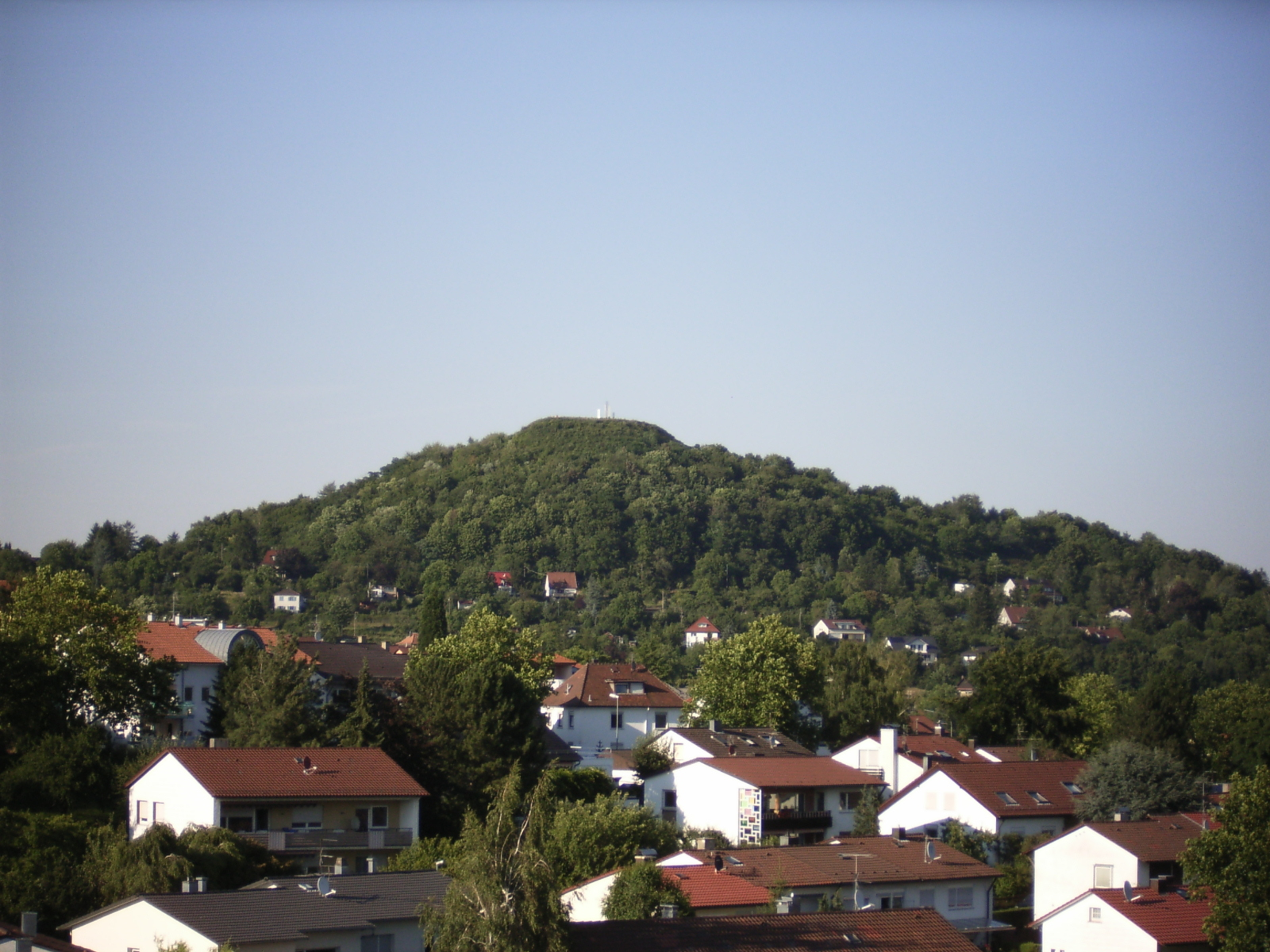 Das Bild zeigt den Pforzheimer Wallberg betrachtet vom Pforzheimer Stadtteil Arlinger aus.